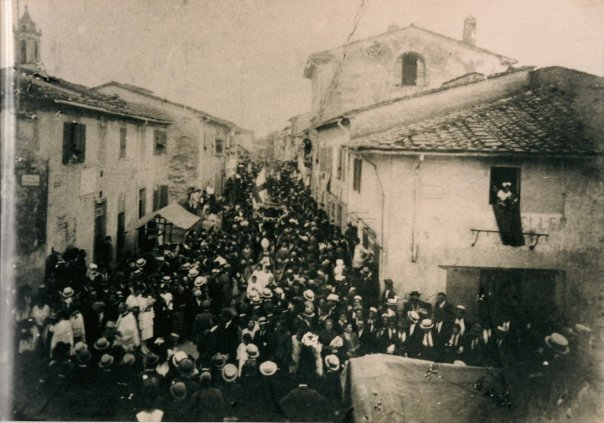 Processione per le vie di Iolo delle reliquie di San Pio martire in occasione del centenario della proclamazione.